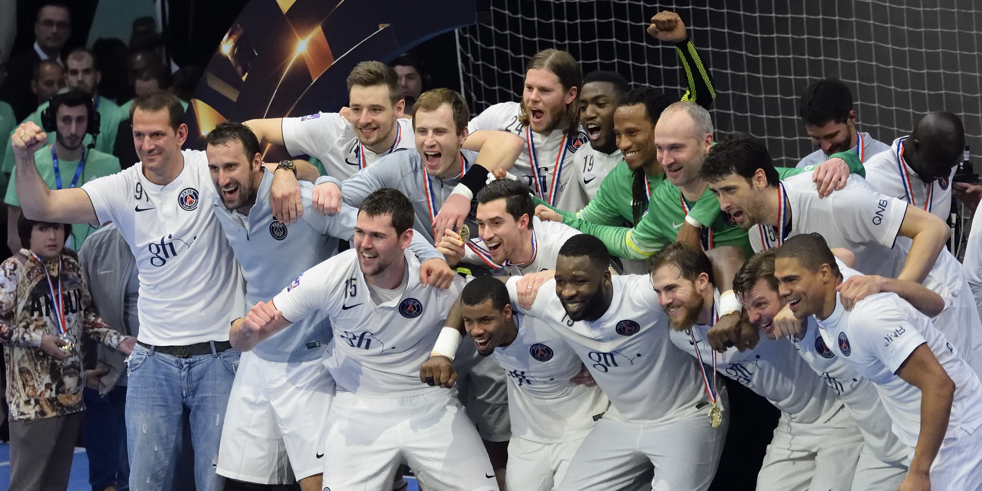 Le PSG Handball, vainqueur de la Coupe de France de handball. Au stade Pierre de Coubertin à Paris 16e, le 26 avril 2015.